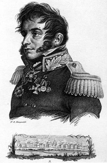 Тучков Сергей Алексеевич (гравюра, А. Ухтомский).